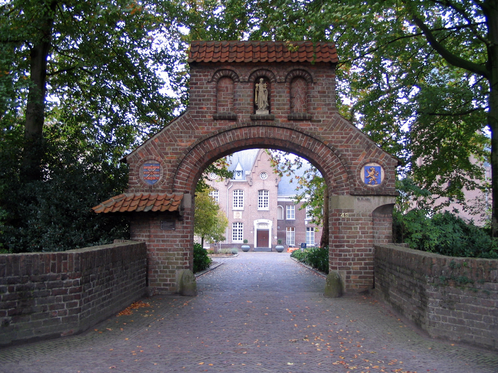 De abdij poort, straatzijde